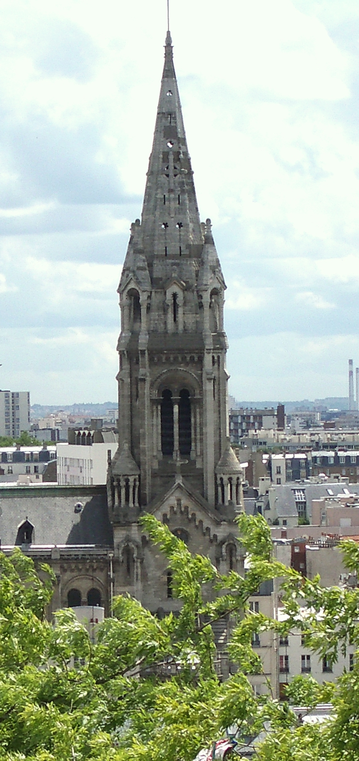 Vue de l'extérieur de Notre-Dame-de-la-Croix de Ménilmontant depuis le 2ème étage du 22 Rue Piat.